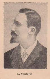 ce fichier était sur déposé le 20:15, 16 Aŭg. 2010 par Uzanto:P.Fiŝo (skanita en privata biblioteko de P.Fiŝo el Analiza historio de Esperanto-movado) avec une licence Attribution-ShareAlike 3.0 Unported (CC BY-SA 3.0)